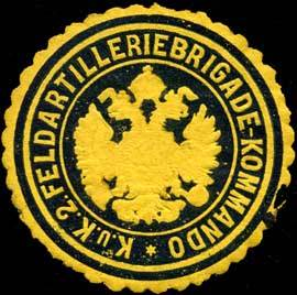 Sealing stamp Title: K.u.K. 2. Feldartilleriebrigade-Kommando Description: gelb, schwarz, geprägt Place: size: 4 cm